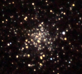 Nucleo del Cumulo Globular 71